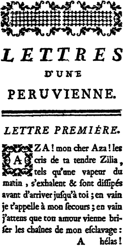 First page of Peruvian Letters, by Françoise d'Issembourg d'Happoncourt de Graffigny (1695-1758)